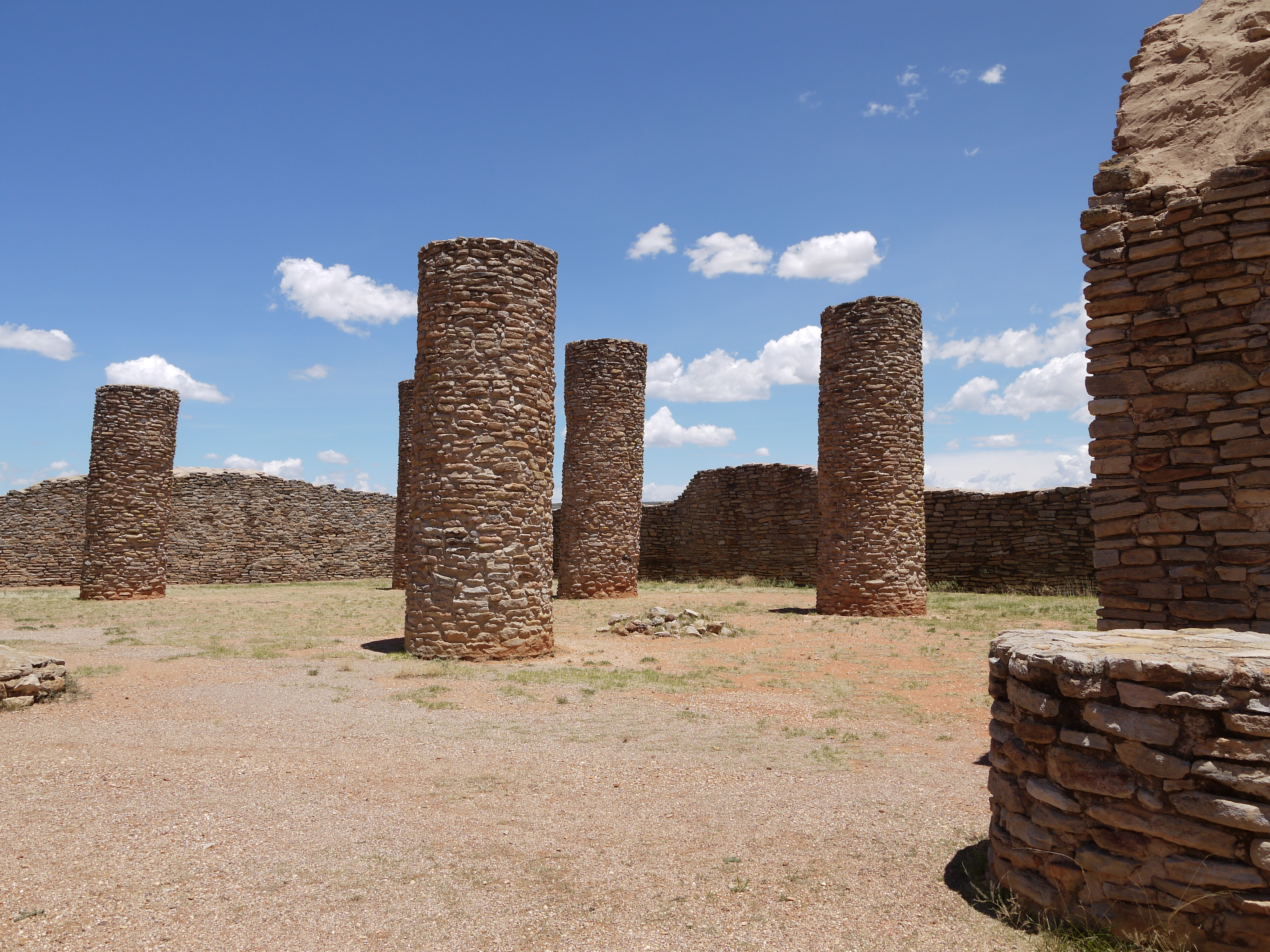 La Quemada, Salón de columnas